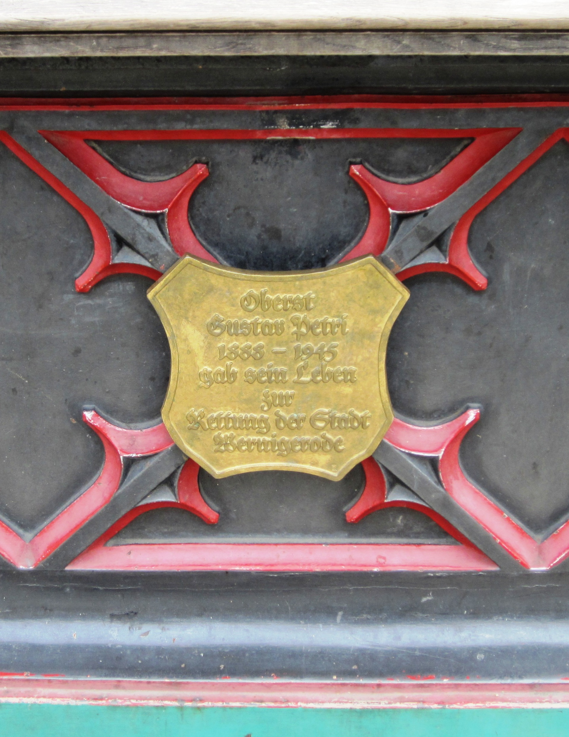 Erinnerungsplakette an Gustav Petri (1888–1945) am „Wohltäter-Brunnen“ in Wernigerode